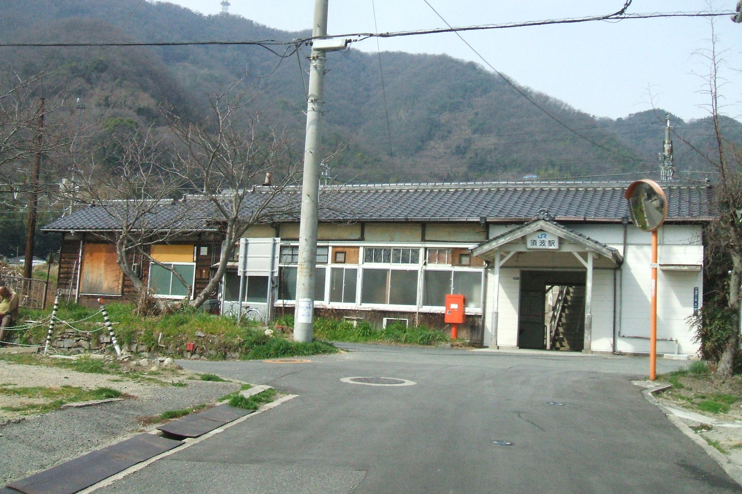 広島県三原市にあるJR西日本呉線須波駅の駅舎正面